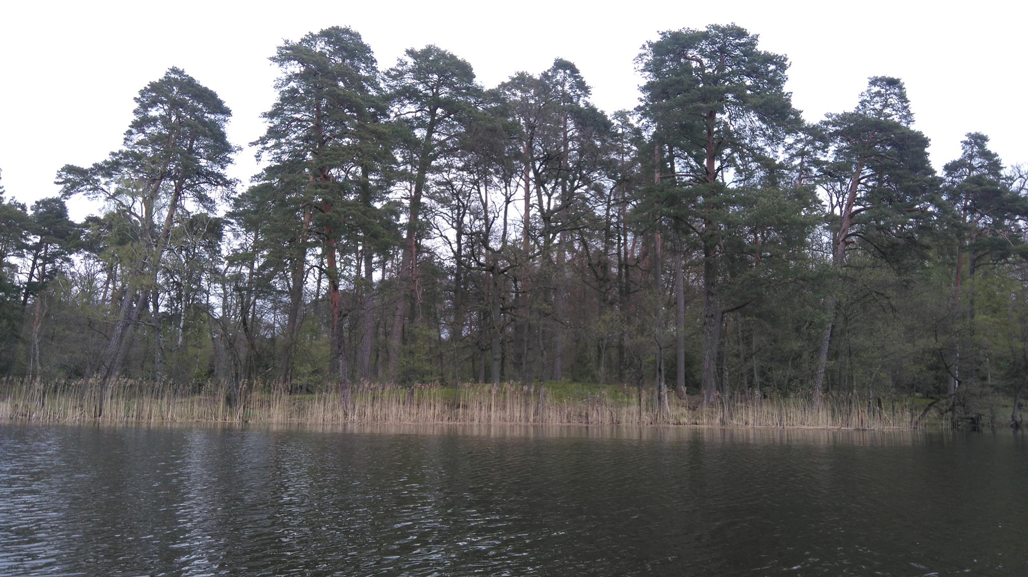 Stare lasy sosnowe i dębowe nad jeziorem Borówno stanowią ważny rezerwuar lokalnej bioróżnorodności (fot. P.M. Owsianny)